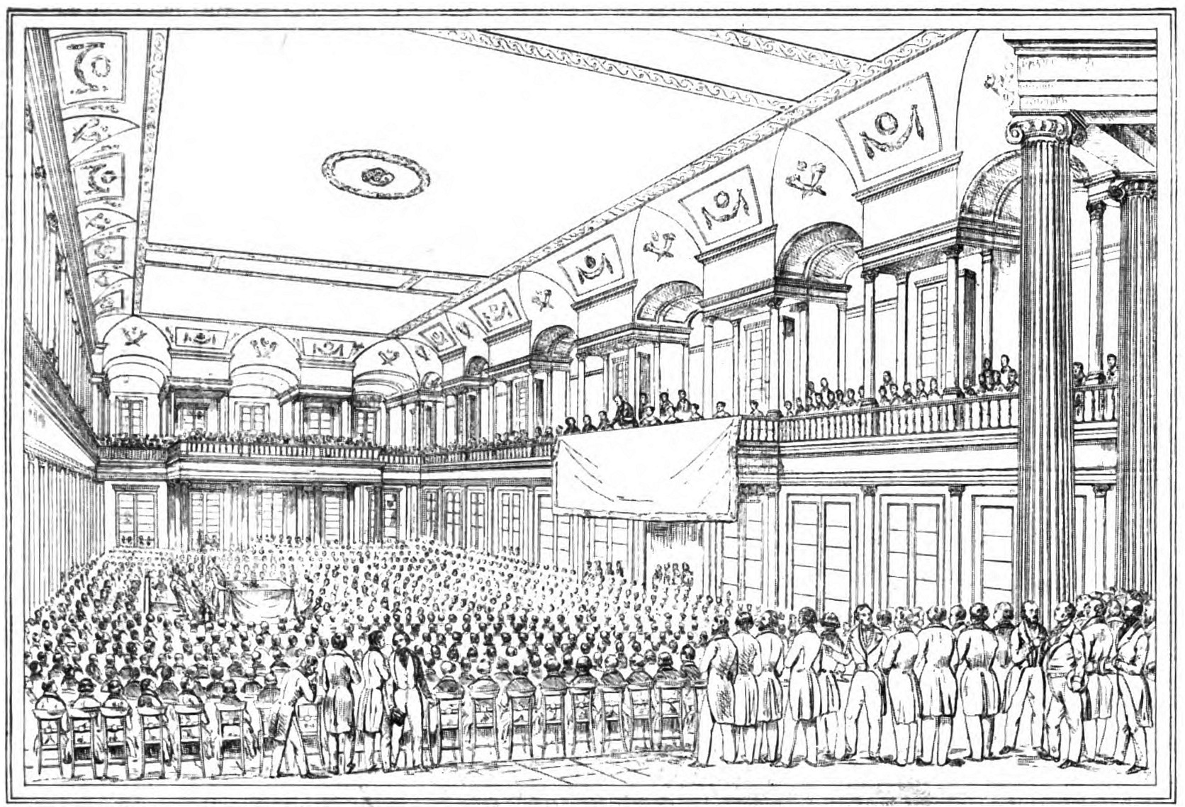 Seduta inaugurale del VII congresso dei Dotti nella sala del museo mineralogico in Napoli il 20 settembre 1845 nel momento in cui re Ferdinando II dalla tribuna reale rivolge parole alla riunione.